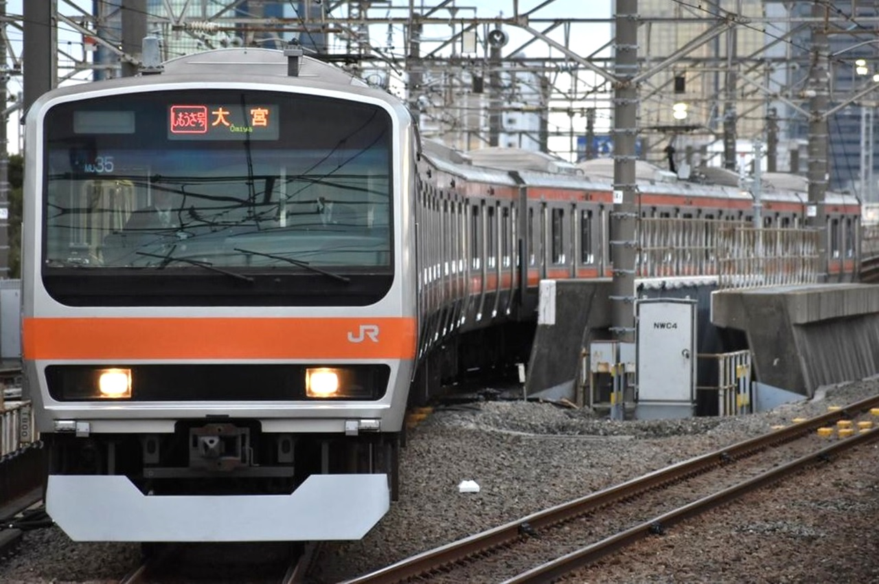 E231系0番台千ケヨMU35 @新習志野駅